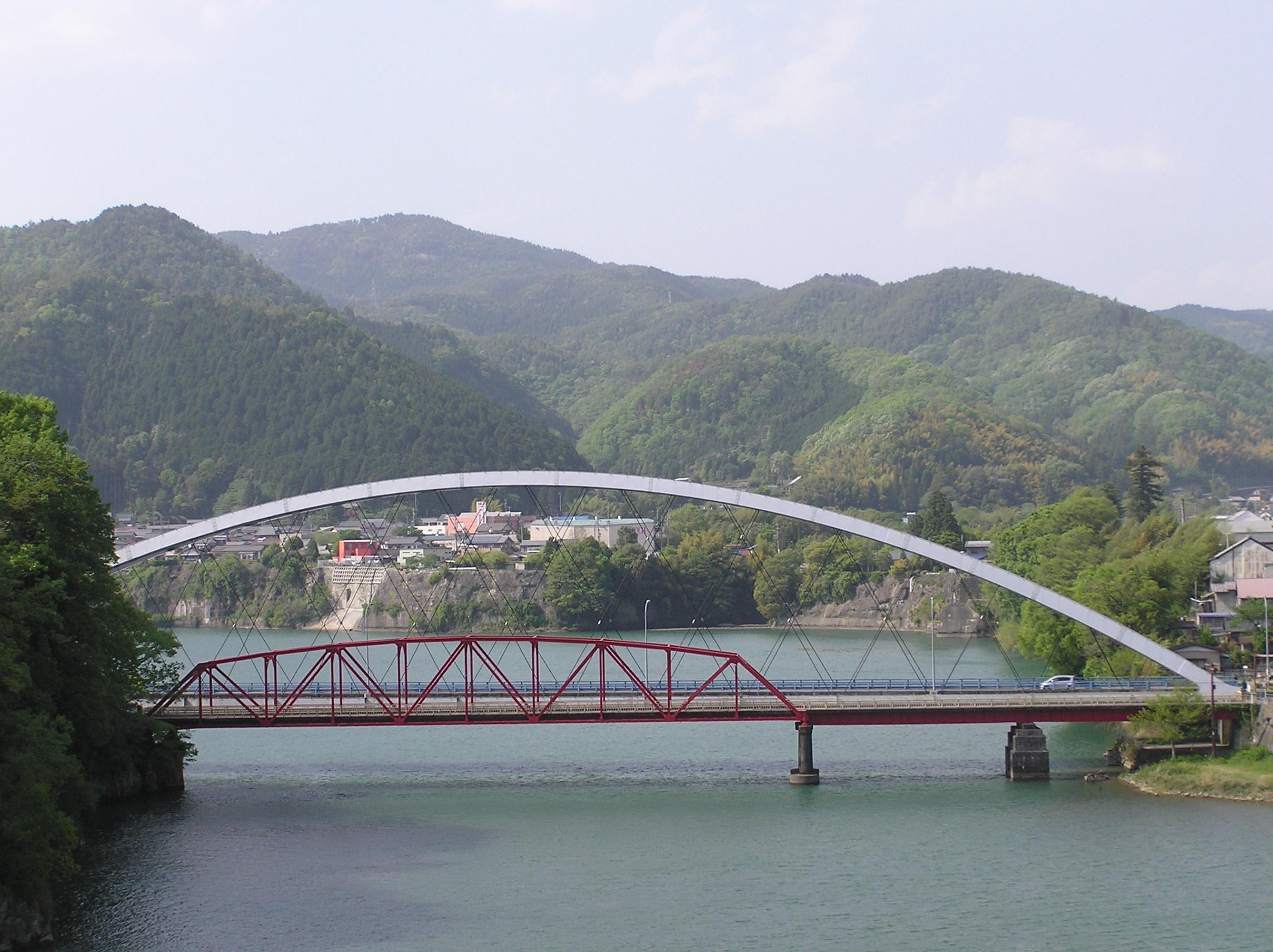 八百津橋（岐阜県加茂郡八百津町）